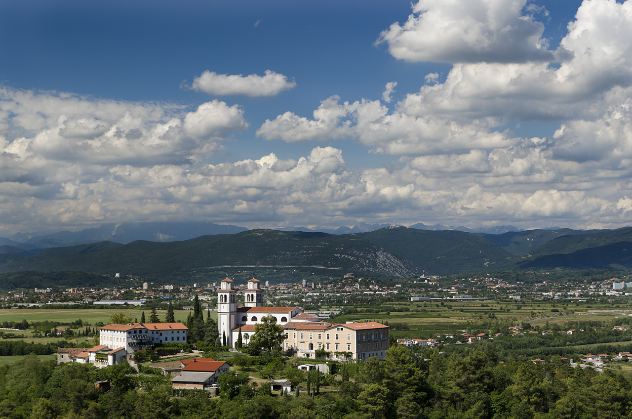 Mirenski grad, letališče v Italiji. Zadaj še Sabotin in Sv. Gora. Slikano s ceste Miren - Opatje selo.